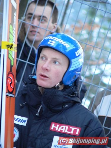 Tami Kiuru - fiński skoczek narciarski podczas Pucharu Świata w skokach narciarskich Zakopane 2006.